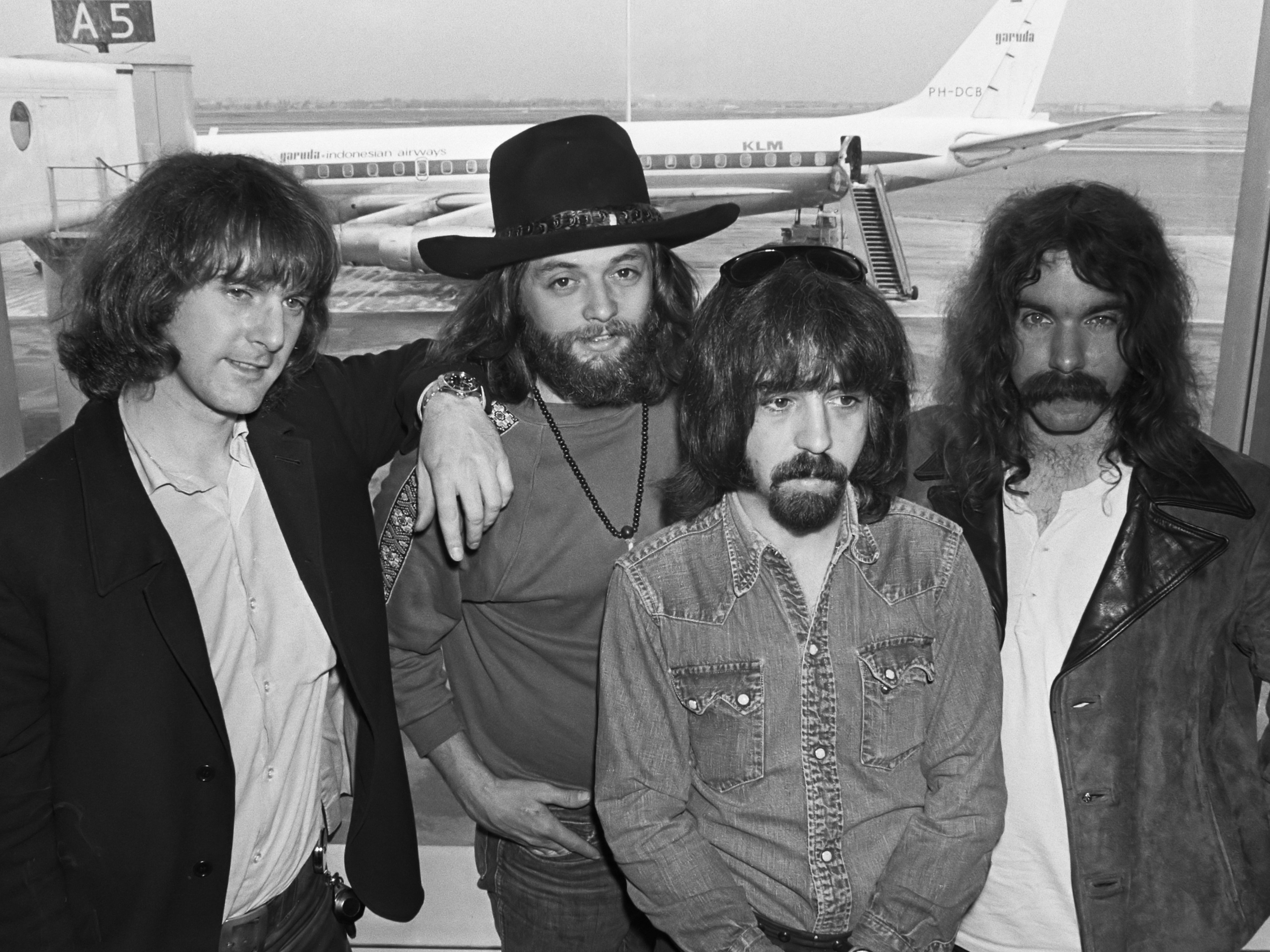 Popgroep de "Byrds" arriveert op Schiphol; de Byrds. V.l.n.r. Roger McGuinn, Skip Battin, Clarence White, Gene Parsons. *23 juni 1970